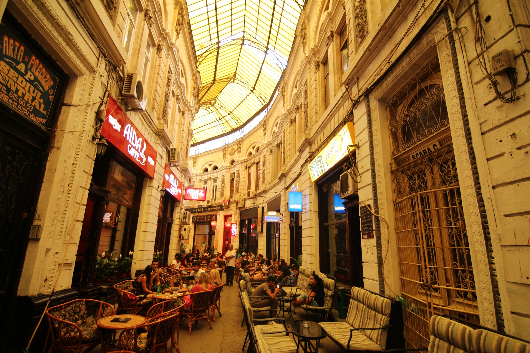 Ansamblul de arhitectură "Pasajul Macca- Villacrosse"